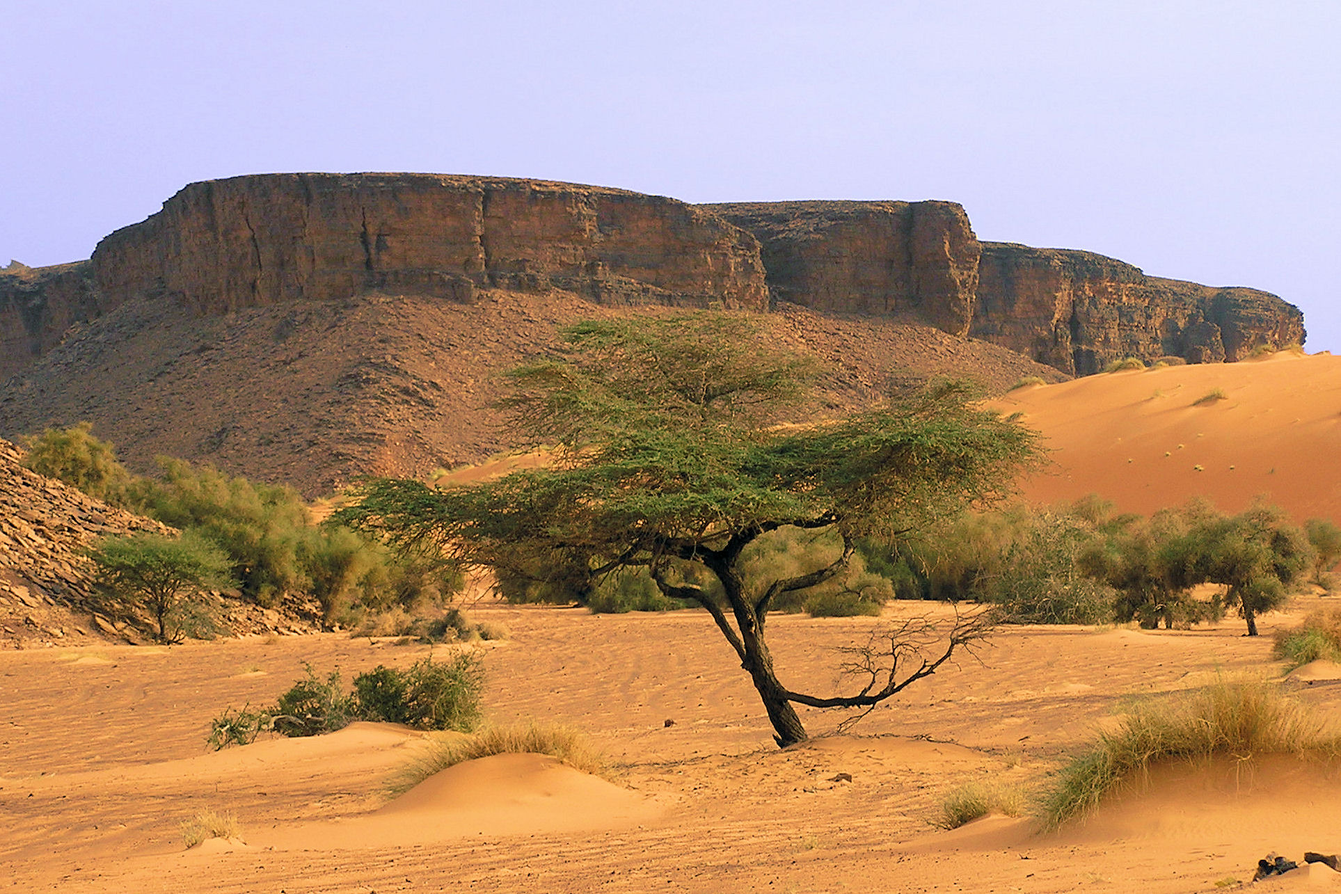 photo prise en janvier 2007 par Emmanuel Brunner (= Utilisateur:Manu25)